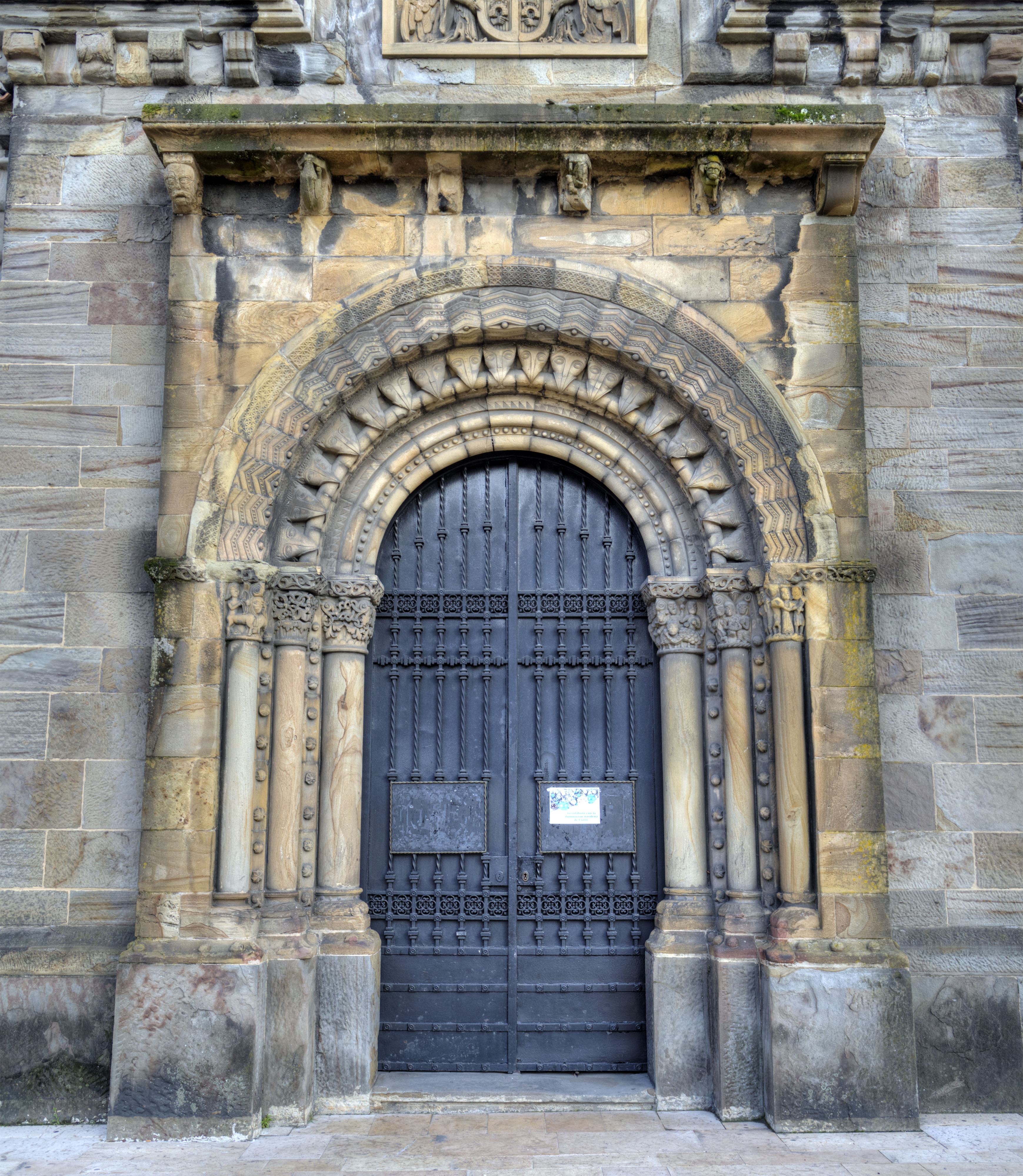 Es una iglesia ubicada en la parroquia de Ciaño, en el concejo de Langreo, Asturias. Conserva dos portadas de origen románico. La imagen muestra la occidental y principal.